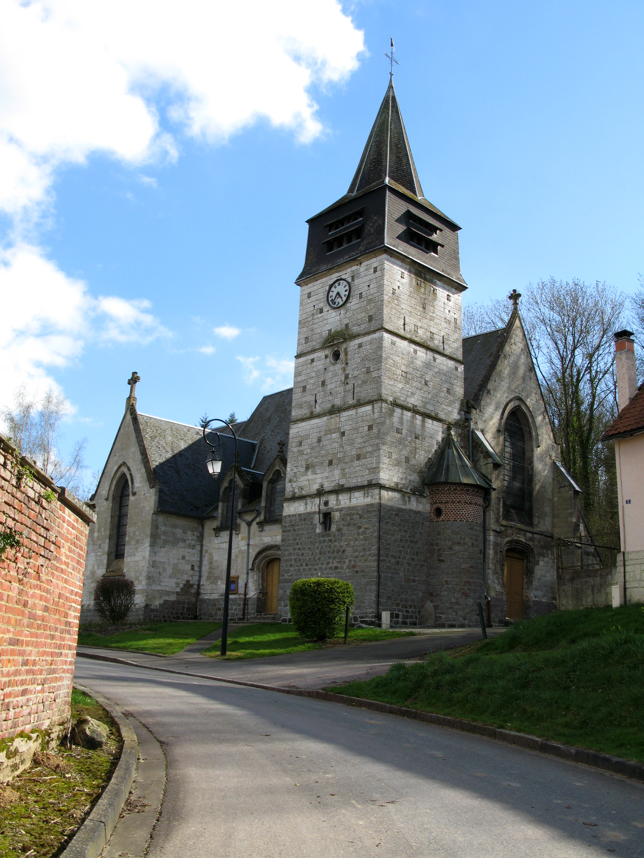 Toutencourt (Somme, France) - L'église. On remarque l'importante épaisseur de grès constituant la base du clocher. La motte castrale se trouve plus à l'Ouest (ici, à droite).